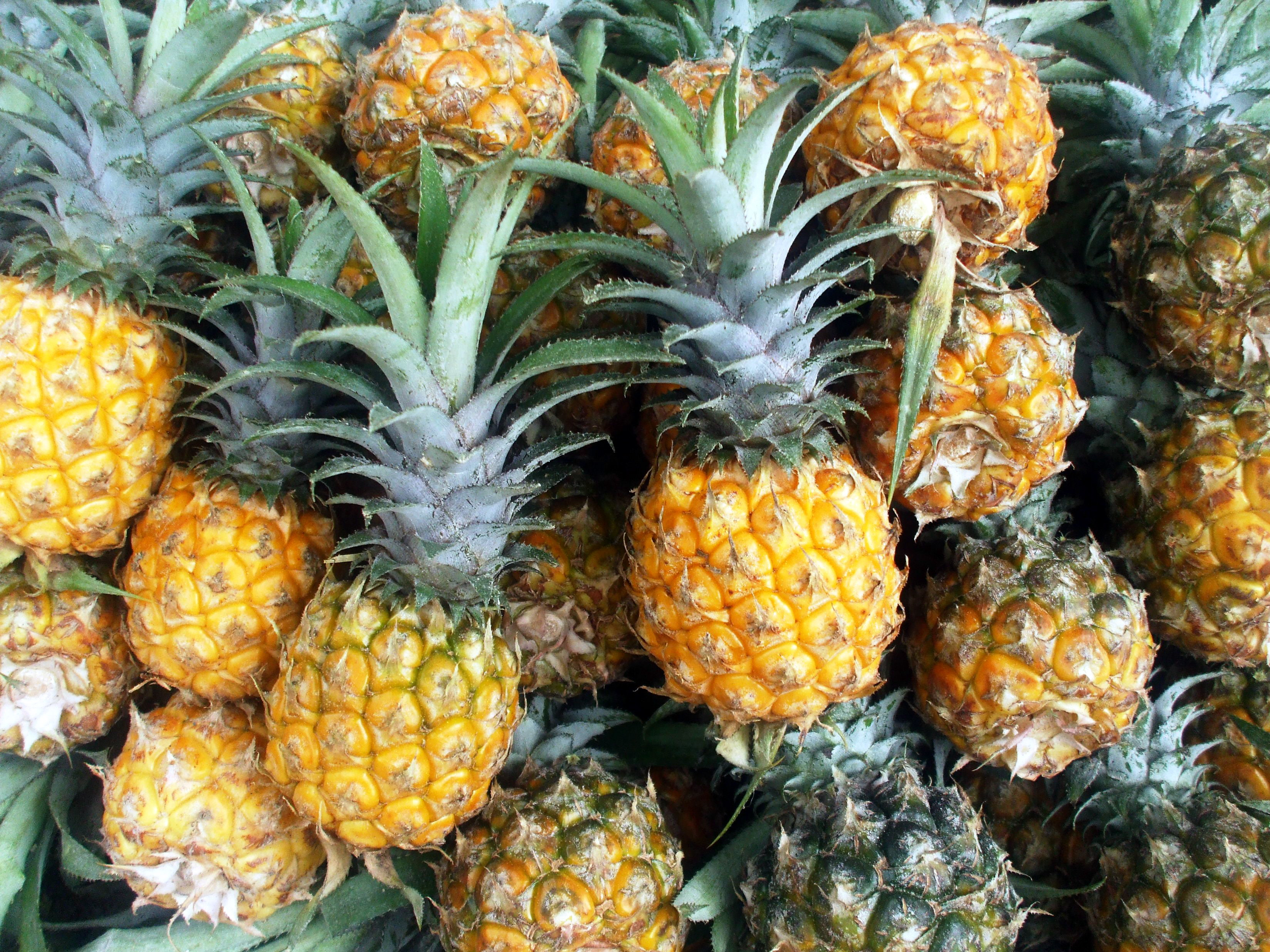 Dứa (khóm) tại Việt Nam